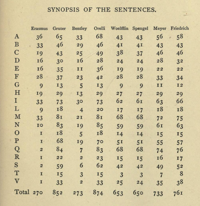 Schema delle varie versioni delle sentenze di Siro.